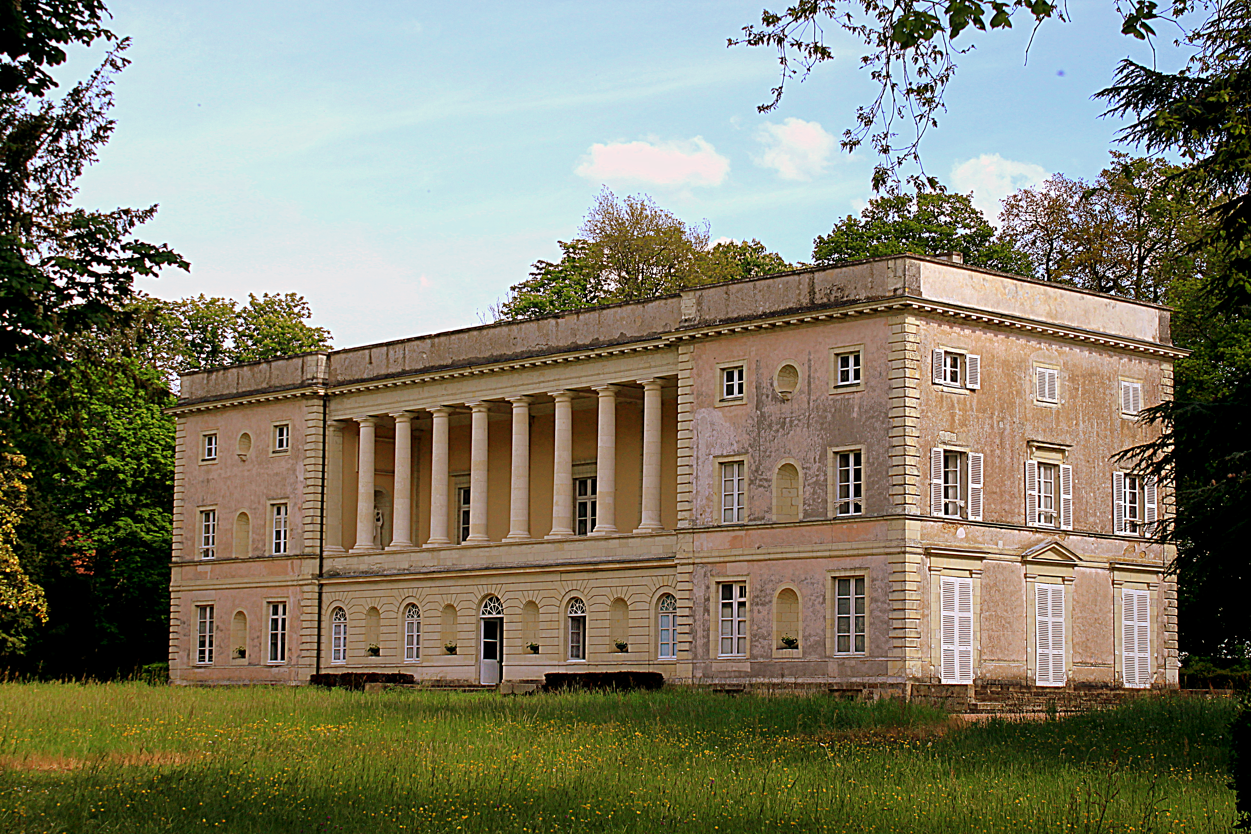 Château de la Noë Bel-Air (1835-1837), façade antérieure Ouest, Fr-44Vallet.